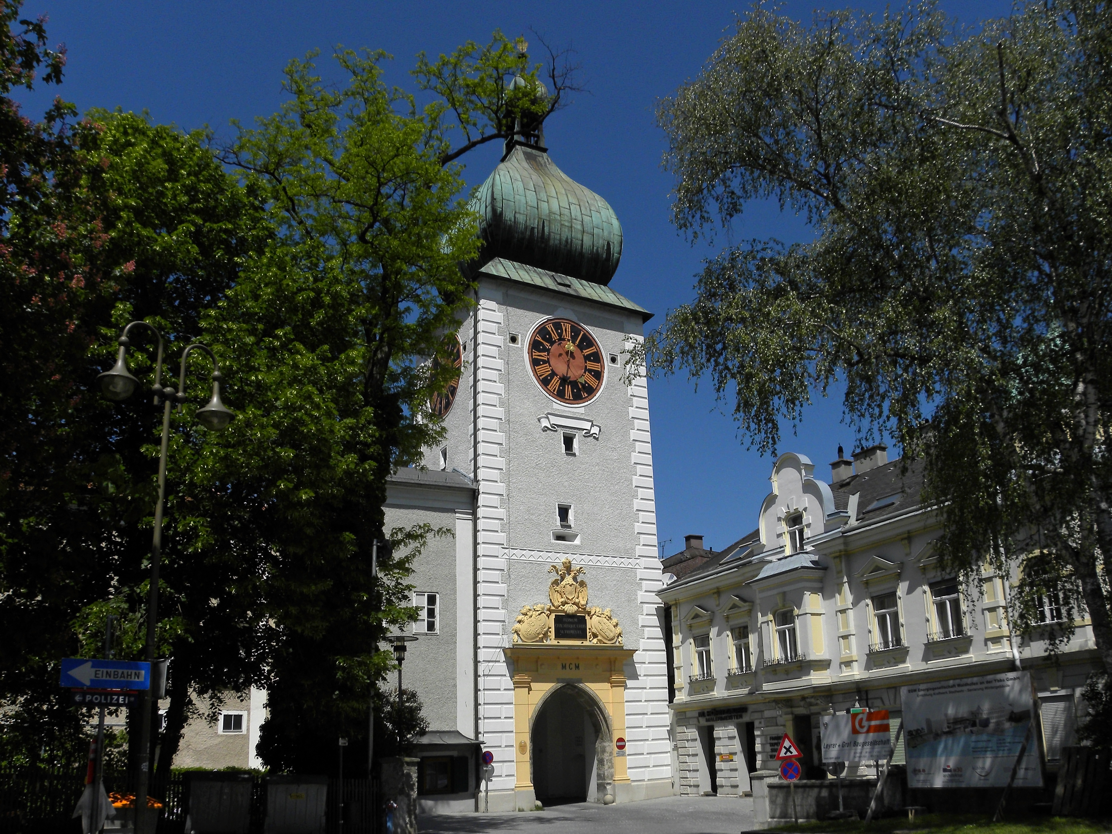 Das Ybbstor mit Renaissance-Rustika und spätgotischen Fensteröffnungen stammt aus dem 13. Jahrhundert und ist das letzte, das Stadtbild deutlich prägende Stadttor, das noch erhalten ist. Der barocke Zwiebelturm kam im Jahr 1778 hinzu, das Profilleistendekor wurde im 19. Jahrhundert angebracht.